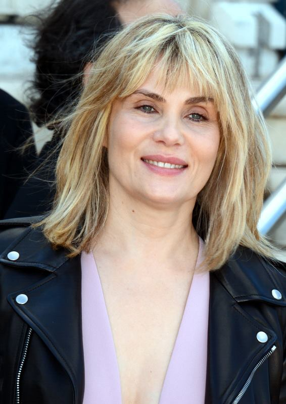 Emmanuelle Seigner au festival de Cannes